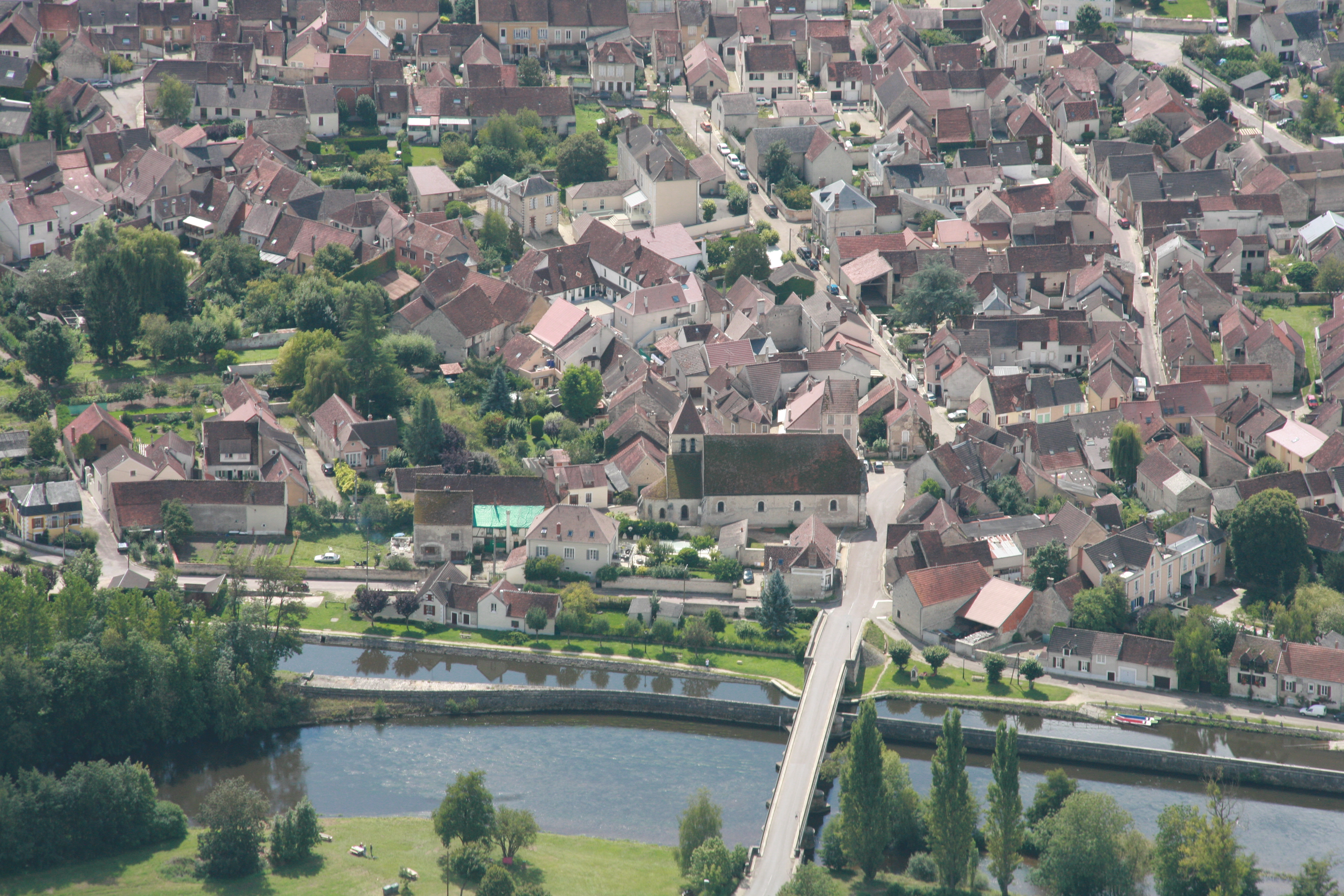 Vue aérienne d'Accolay : la Cure, le canal d'Accolay, l'église et le village